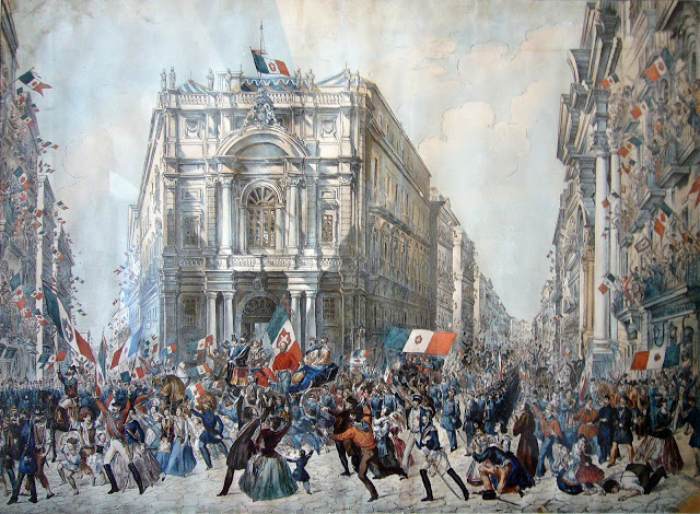 Франц Венцель Шварц (1842-1919) - "Вступление Гарибальди в Неаполь, 7 сентября 1860. Неаполь. Городской музей ди Кастель Нуово